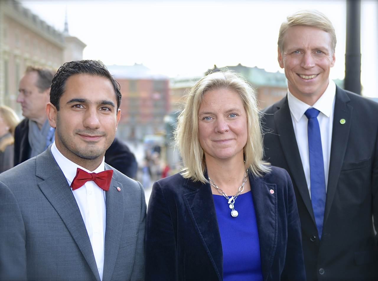 Ardalan Shekarabi, Magdalena Andersson och Per Bolund som nyutnämnda statsråd inom finansdepartementet på lejonbacken utanför Stockholms slott den 3 oktober 2014.